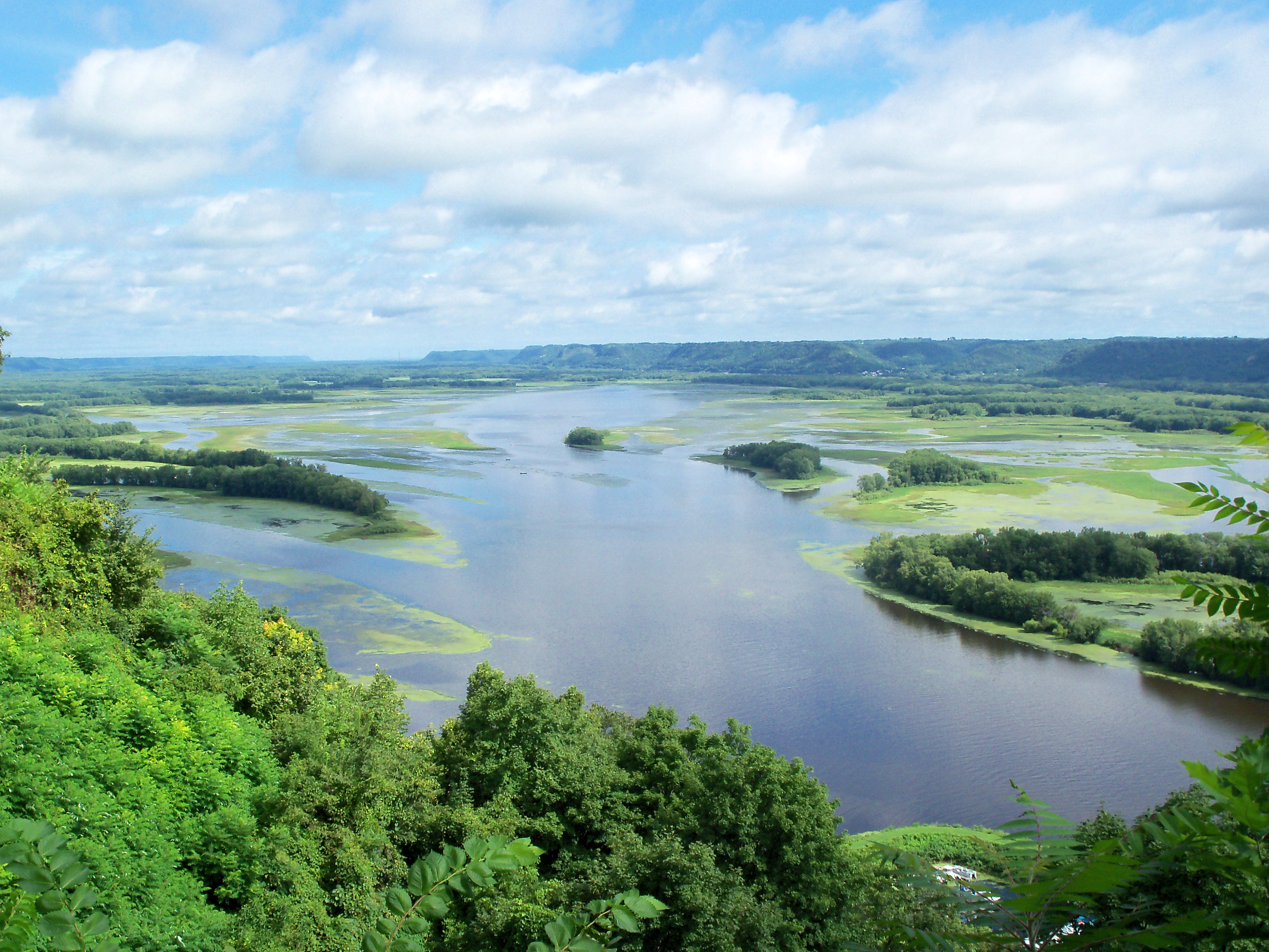 Lansing, IA 52151, USA